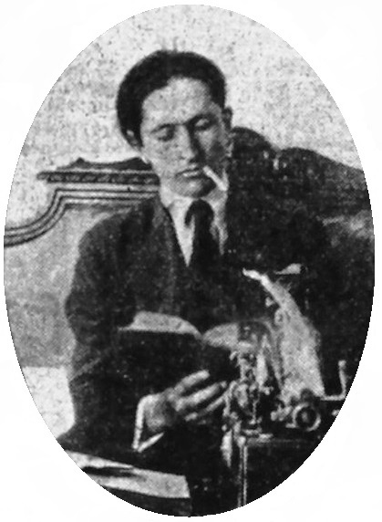 Xoán Xesús González.jpg